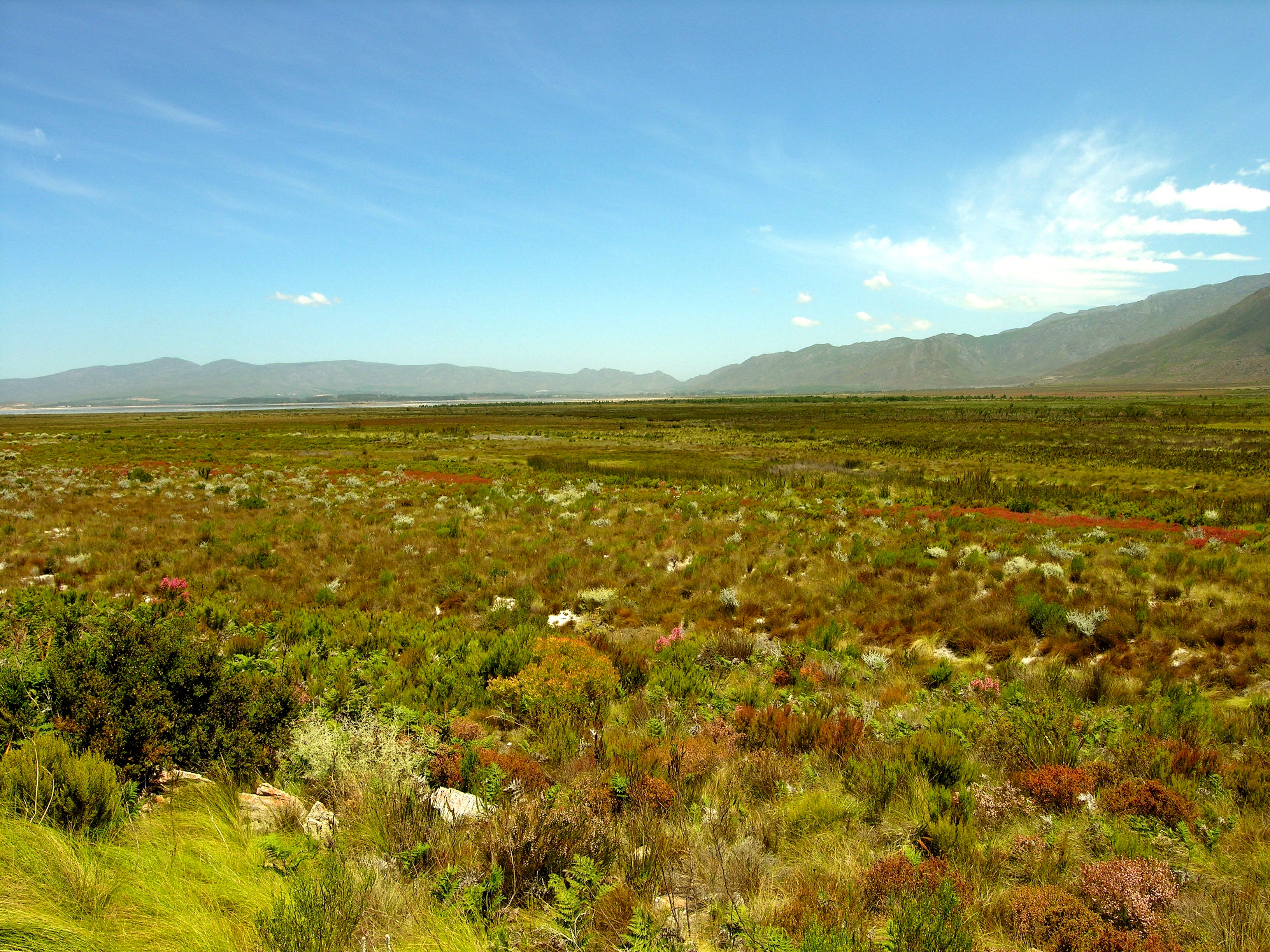 Fynbos near Franschhoek